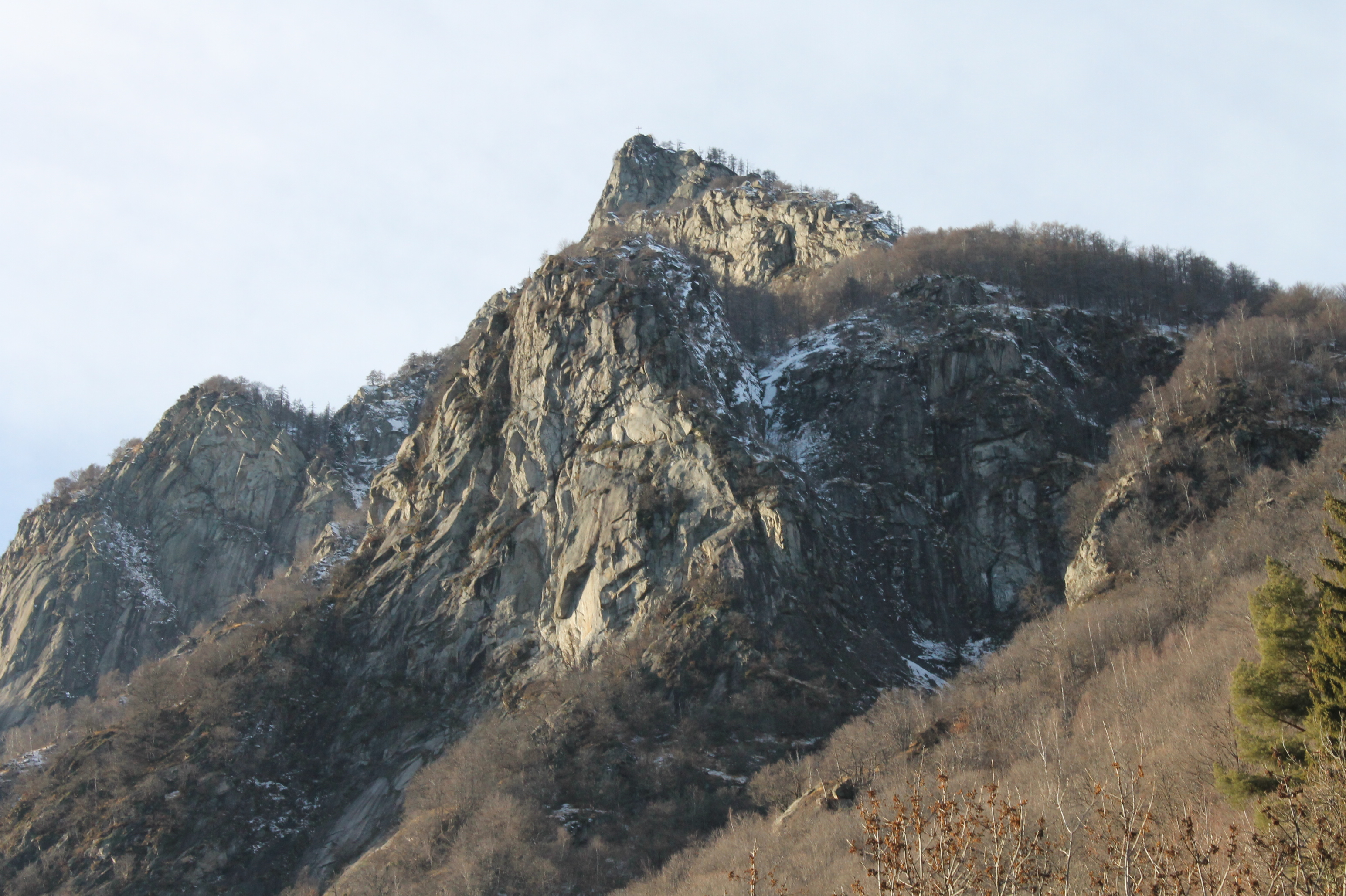 Pizzo della Croce im Valle Onsernone TI (Schweiz), vom Dorf Berzona aus gesehen